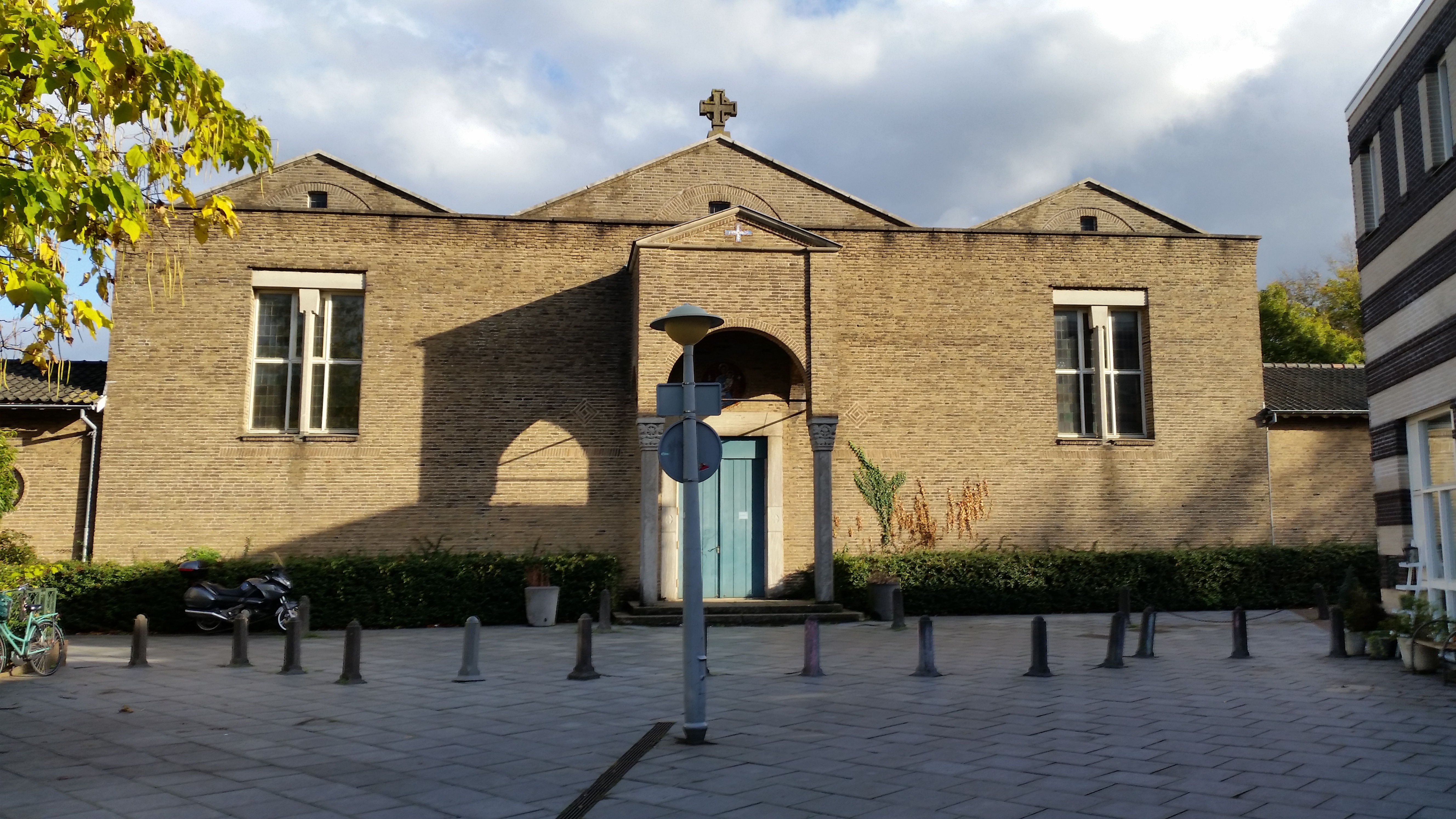 Onze-Lieve-Vrouw-van-Lourdeskerk (Amsterdam)